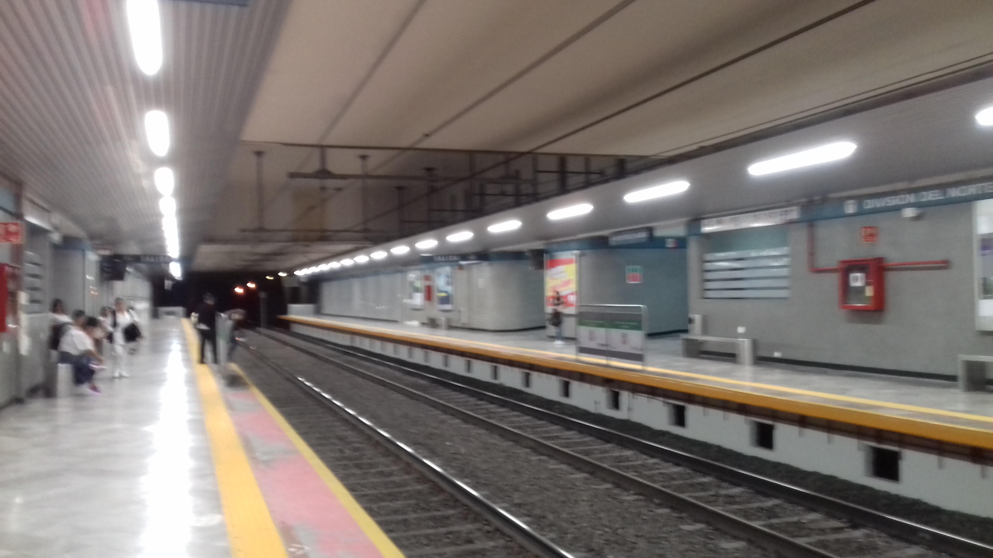 Andenes de la estacion Division Del Norte